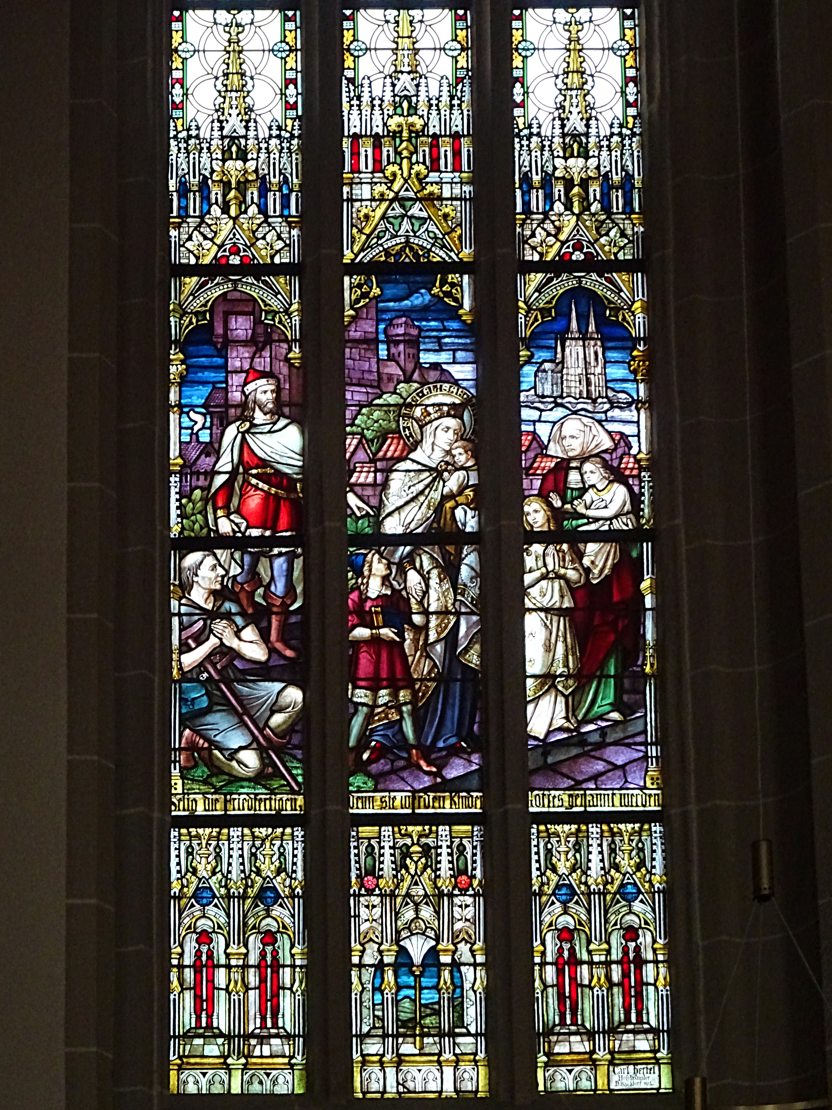 Buntglasfenster in der Pfarrkirche St. Gertrud (Dingelstädt) 7. Selig sind die Friedfertigen, denn sie werden Söhne Gottes genannt werden / Das Leben der hl. Elisabeth von Thüringen